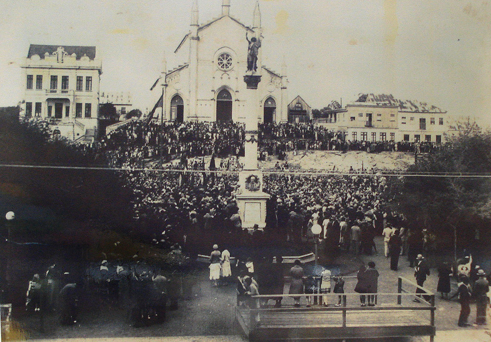 Praça Dante Alighieri em Caxias do Sul. Colocação da pedra fundamental do monumento ao Duque de Caxias